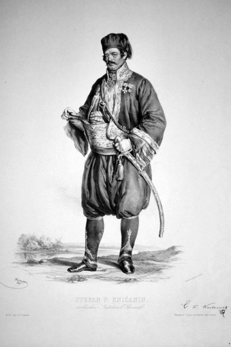 Stephan Knićanin, Lithographie von Josef Kriehuber, 1849